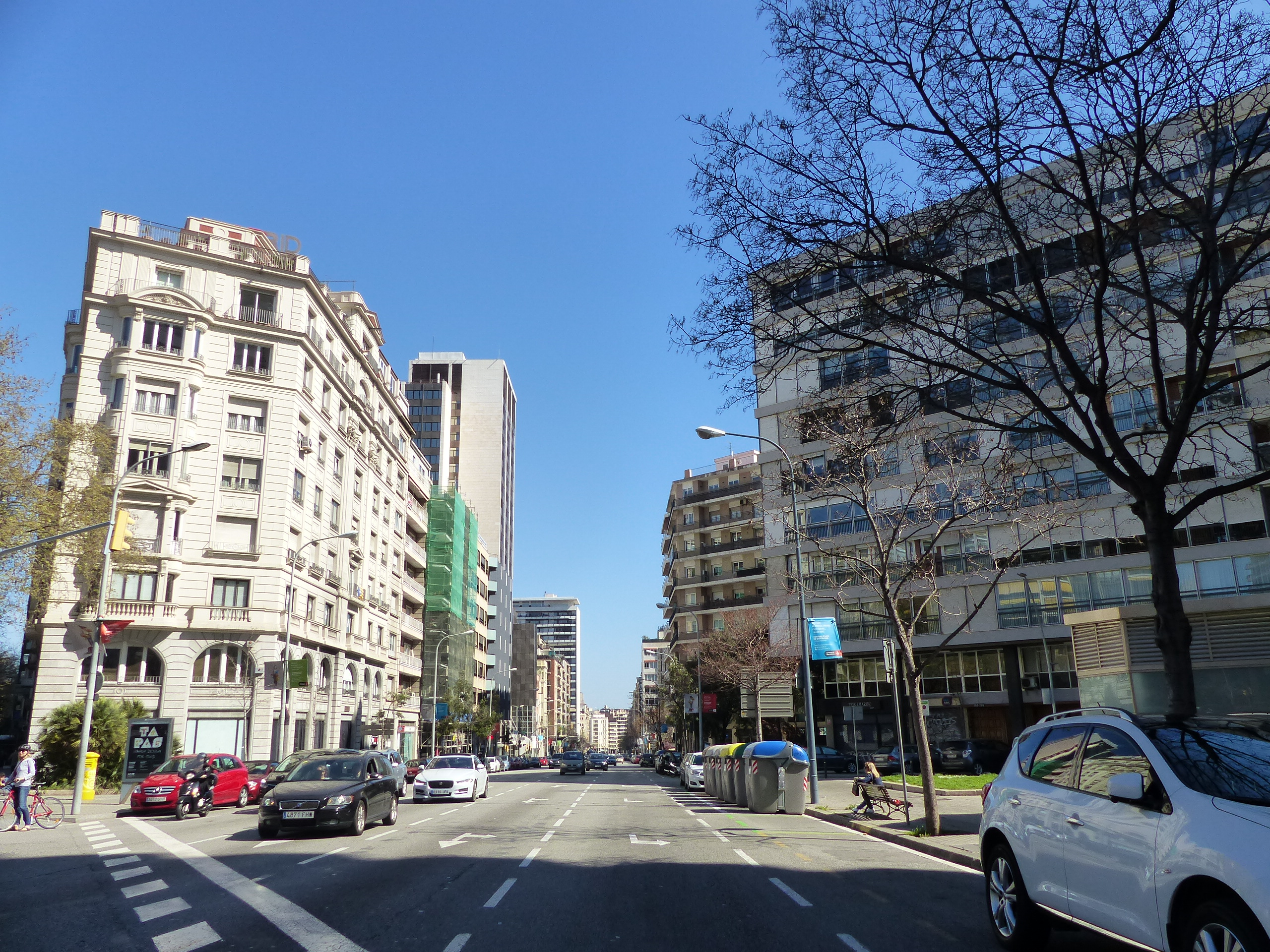 Avenida Sarrià vista desde la avenida Diagonal